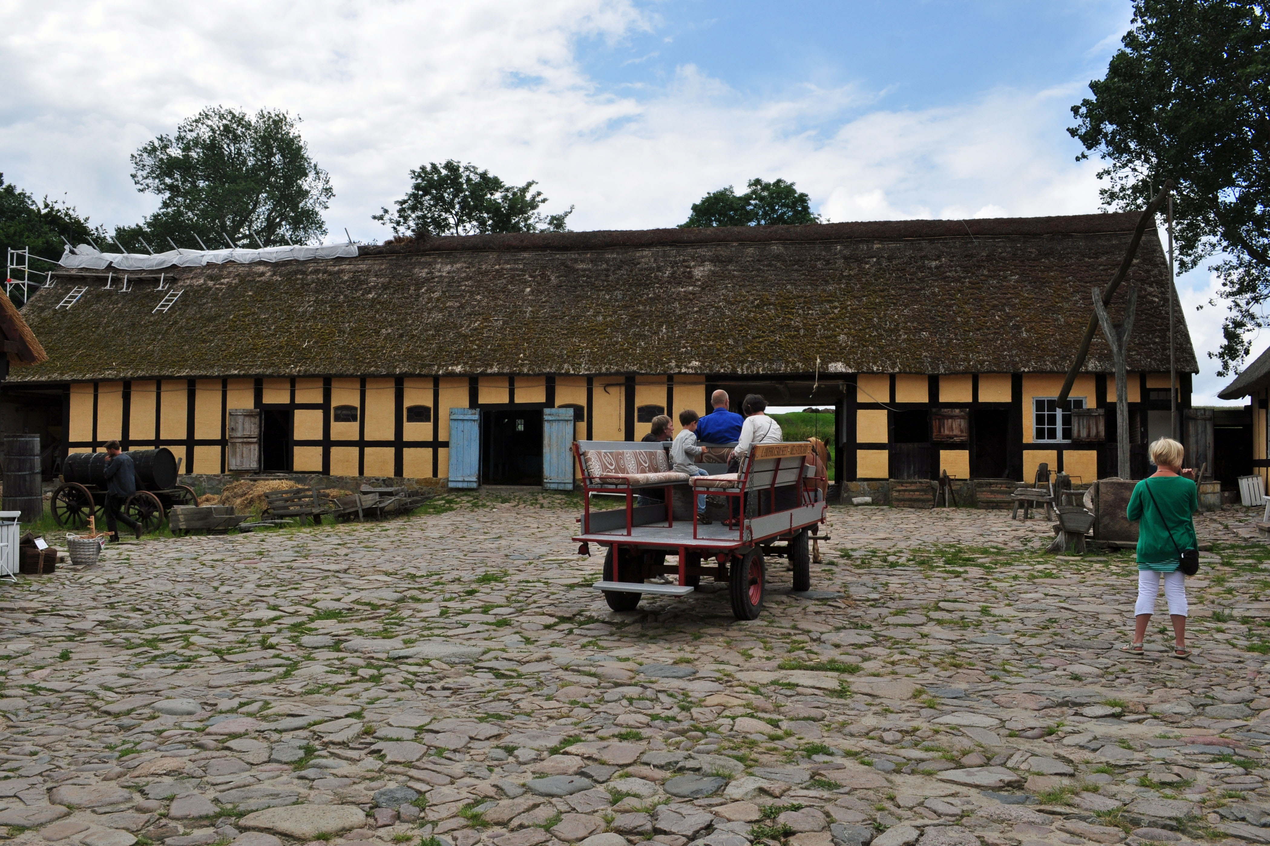 Melsted, Bornholm (2012-07-12), by Klugschnacker in Wikipedia (1) Im Bornholmer Landwirtschaftsmuseum Melstedgård nahe Gudhjem.